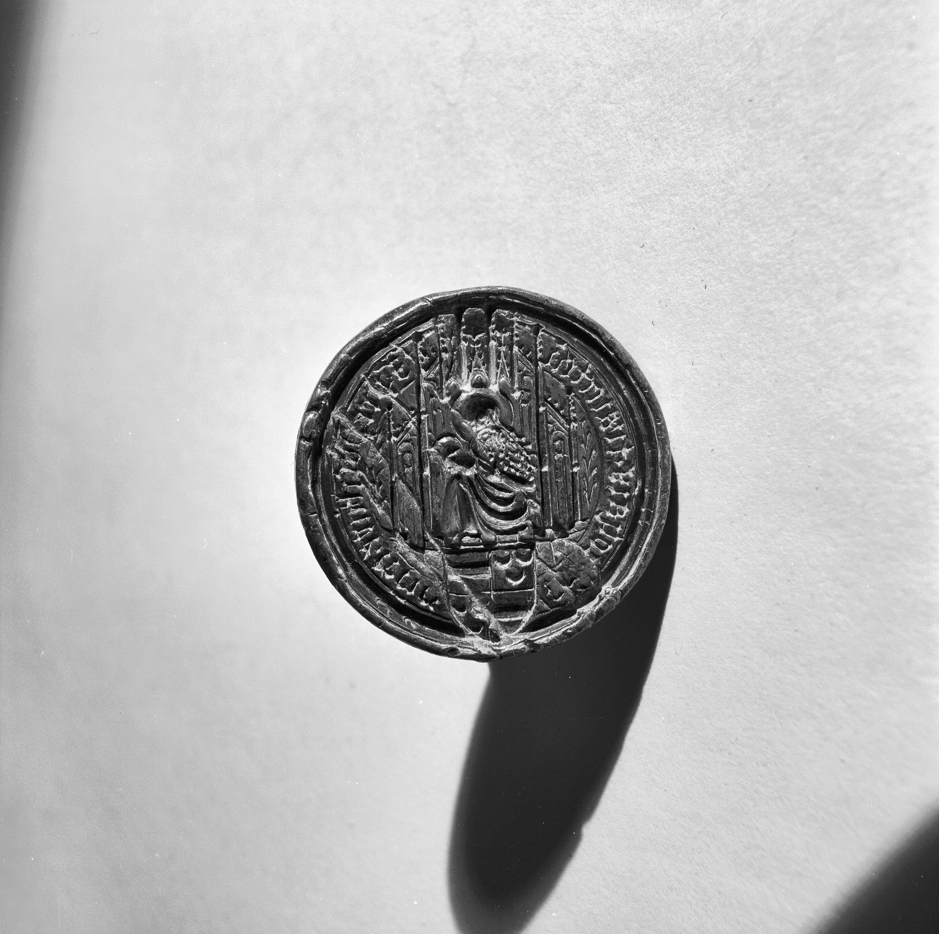 Centraal Museum: stempel van het zegel van de proosdij van Sint Jan met wapen van D. van Wassenaar